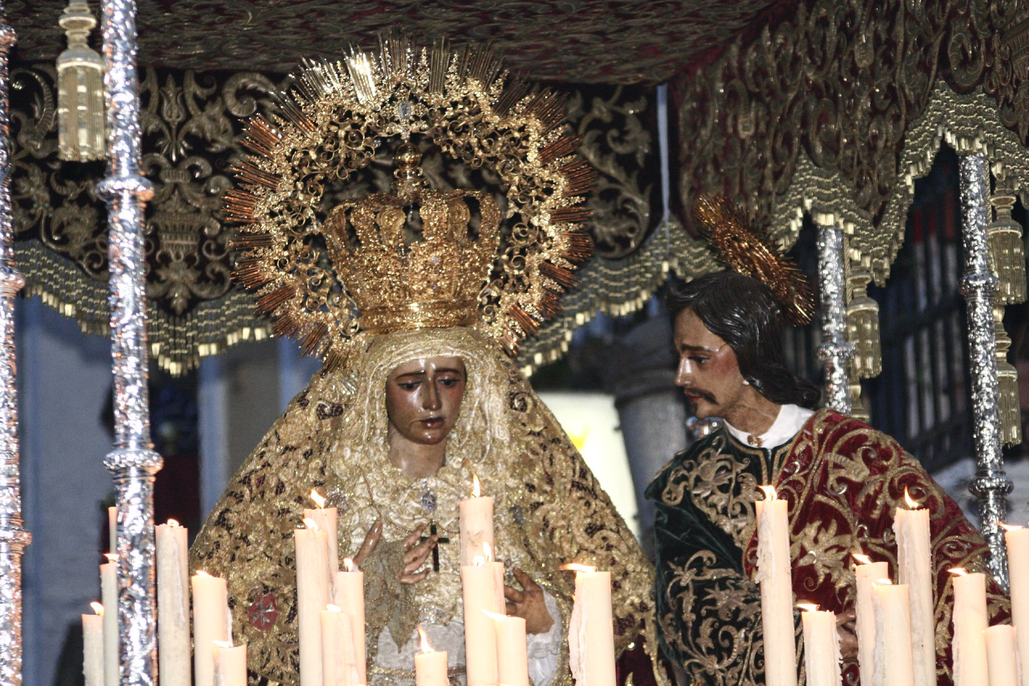 María Santísima de la Amargura Coronada y San Juan Evangelista. Semana Santa en Sevilla. Año 2006 Foto realizada y propiedad de Ángel Chacón